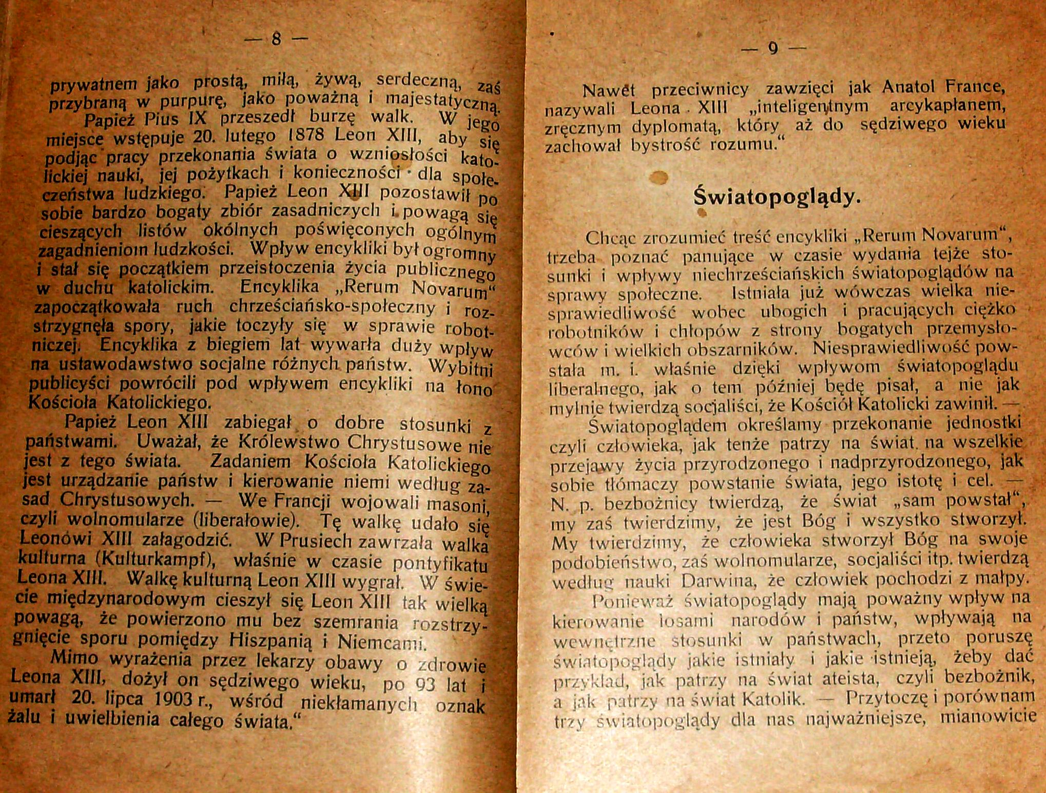 Stanisław Krzyżowski, Rozmyślania w czterdziestą rocznicę encykliki „Rerum novarum”, wydanej 15 maja 1891 r. przez papieża Leona XIII, Pszczyna 1931